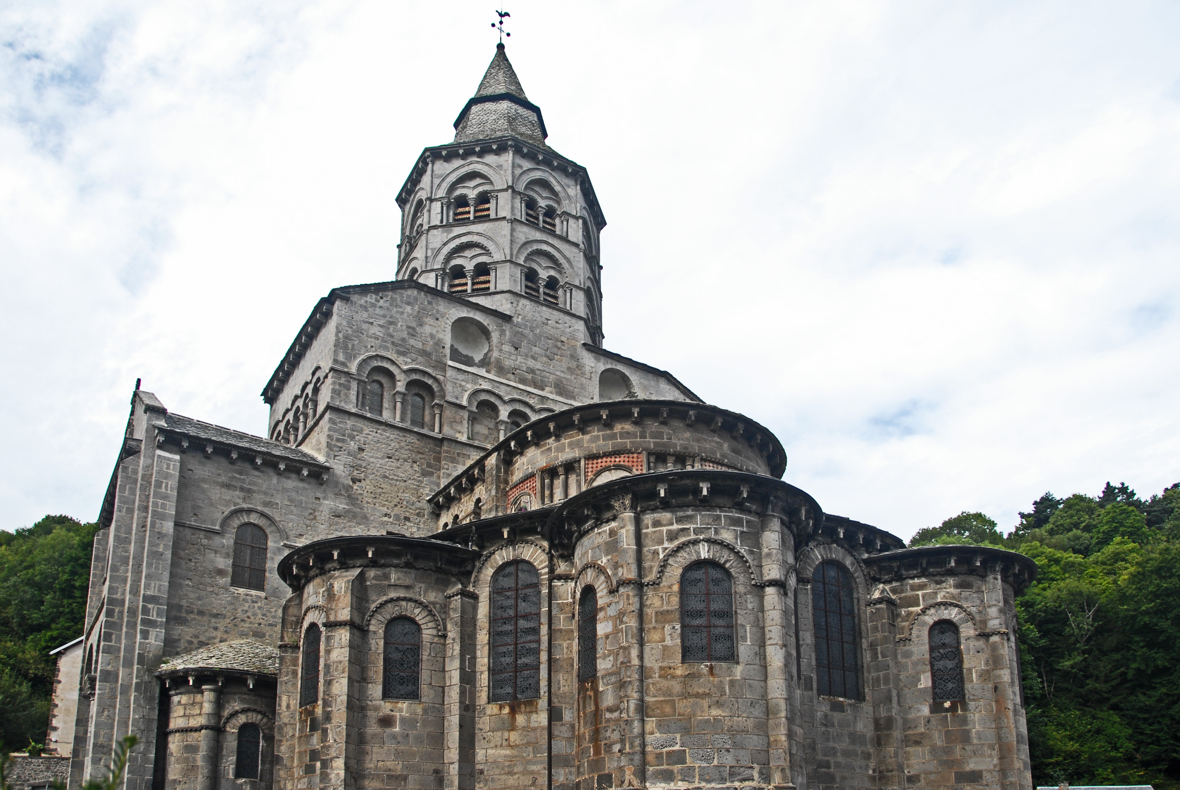 N.-D. d'Orcival, Chorhaupt von SO